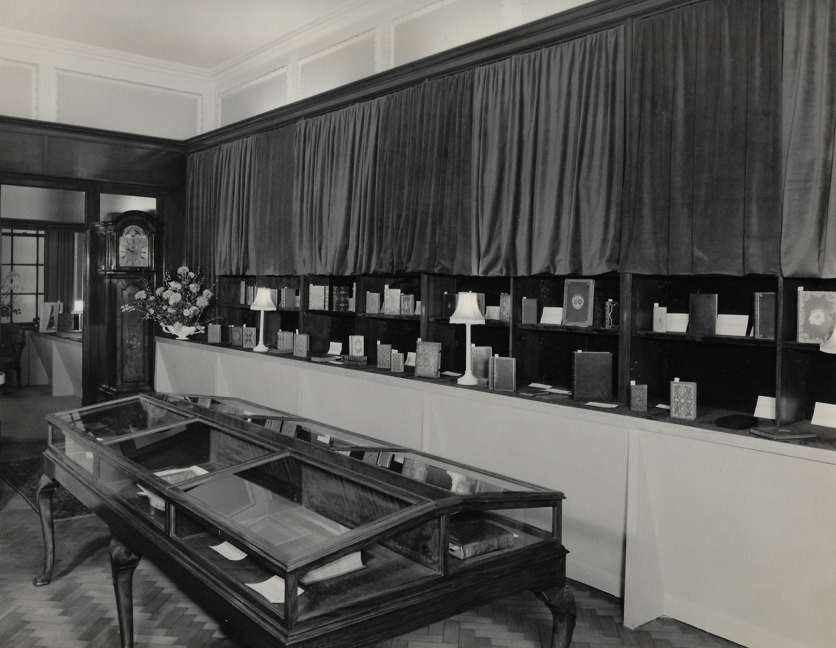 Vue de la librairie Pierre Berès, 14 avenue de Friedland, Paris.